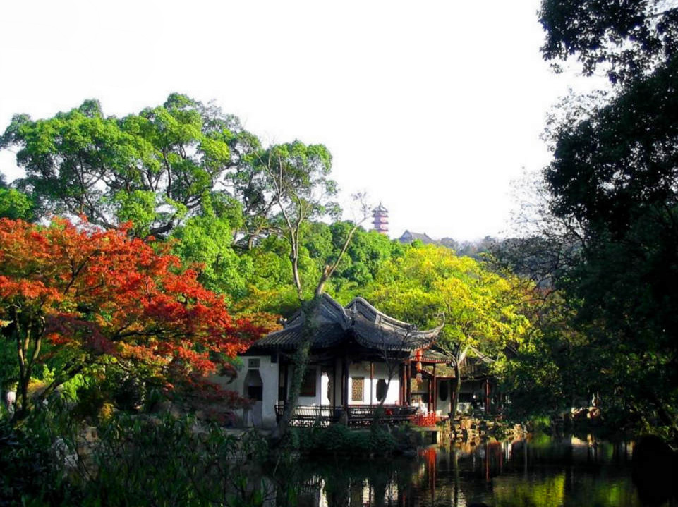 Jichang Royal Garden in Wuxi, China